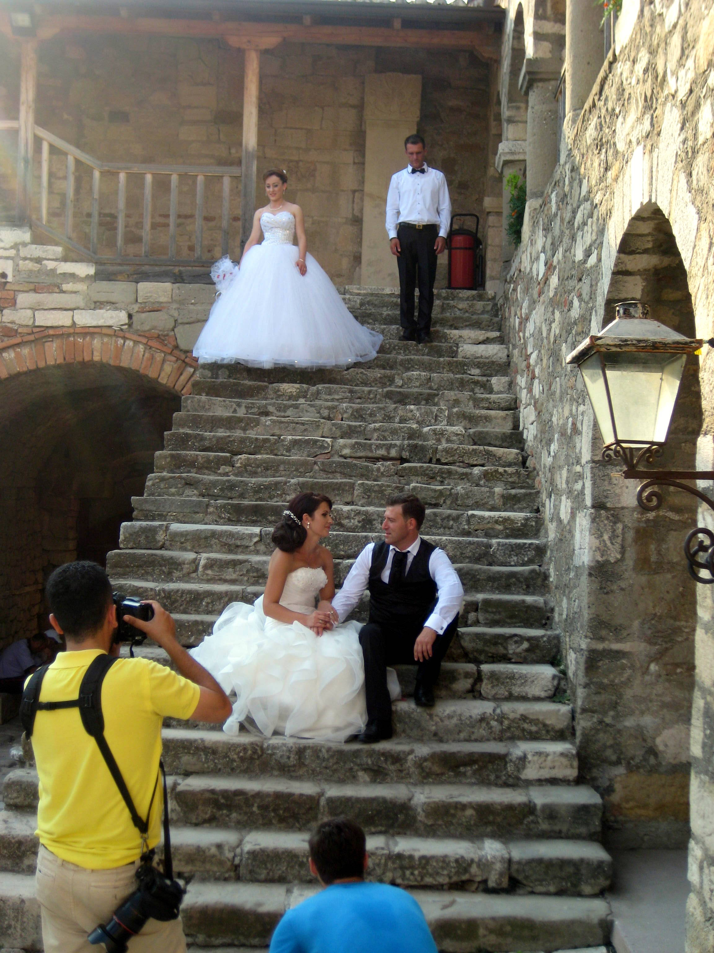 Apollonia (Albania)